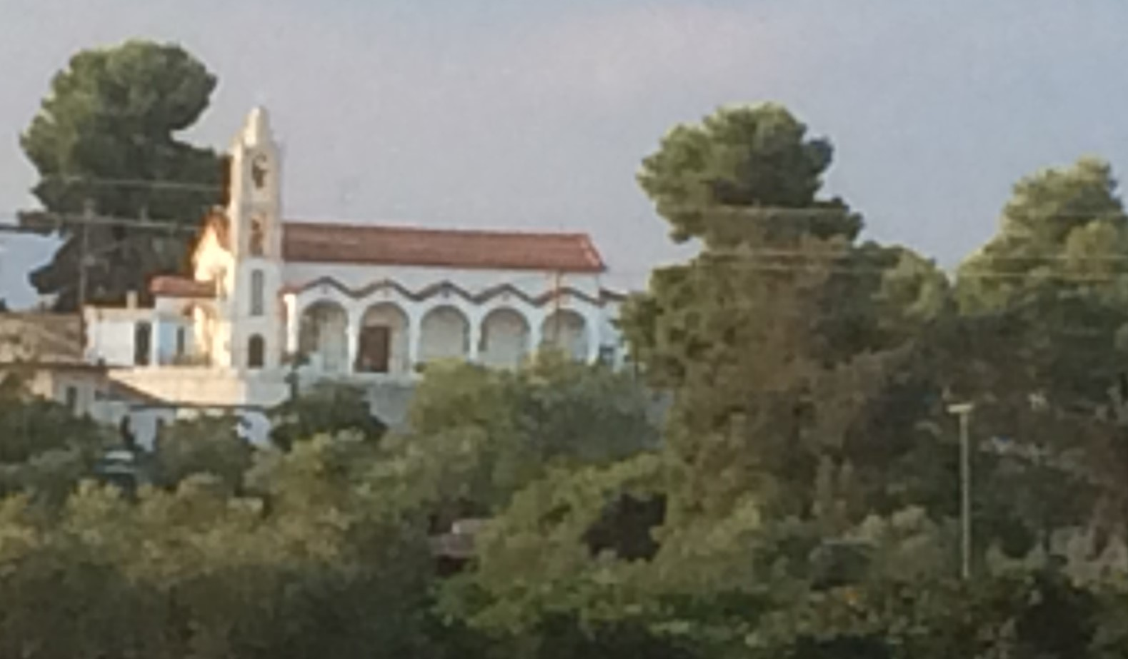 Αστέρι Λακωνίας, Εκκλησία Αγίου Παντελεήμονα